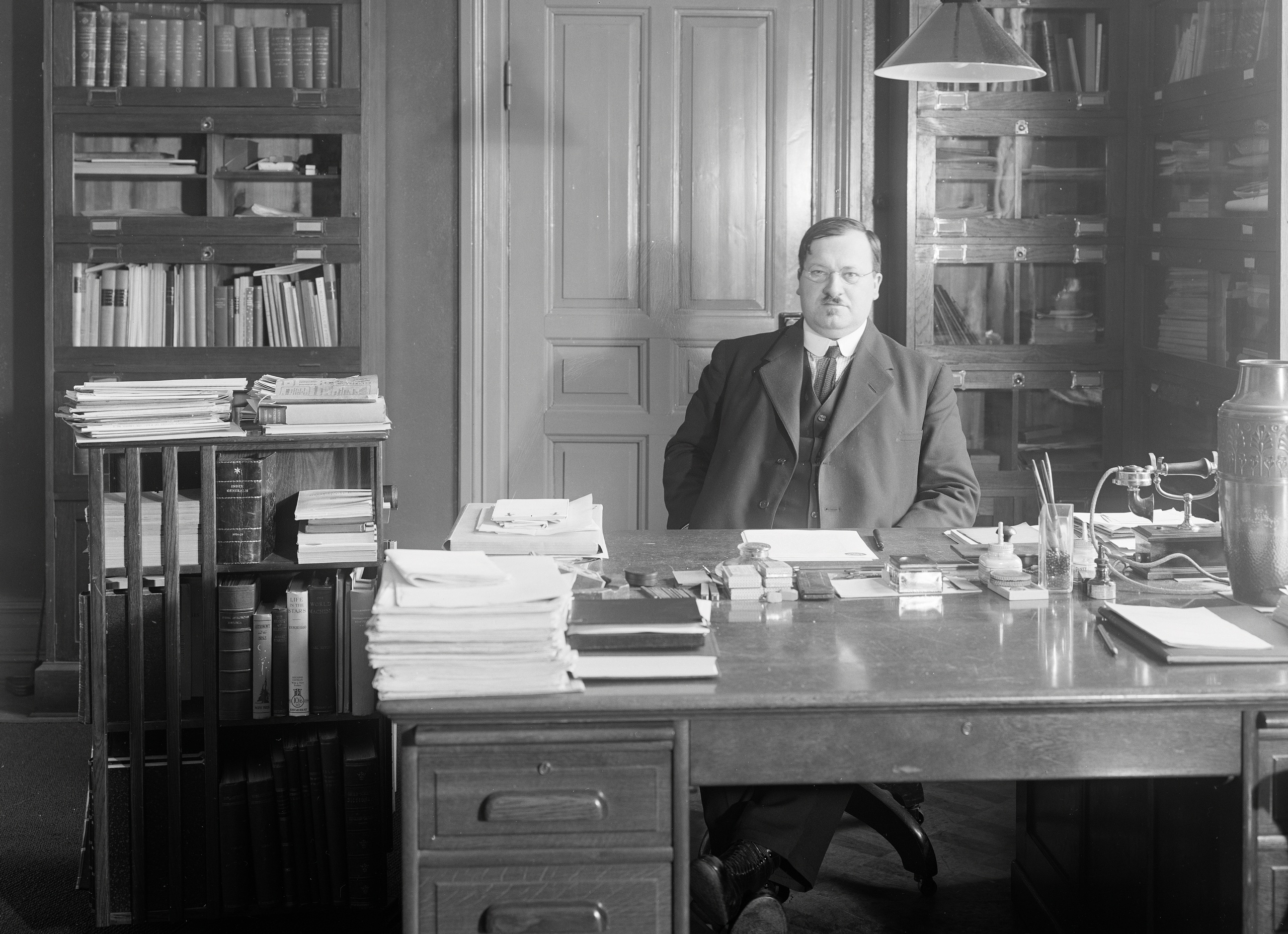 Knut Lundmark, 1889-1958, professor i astronomi vid Lunds universitet.